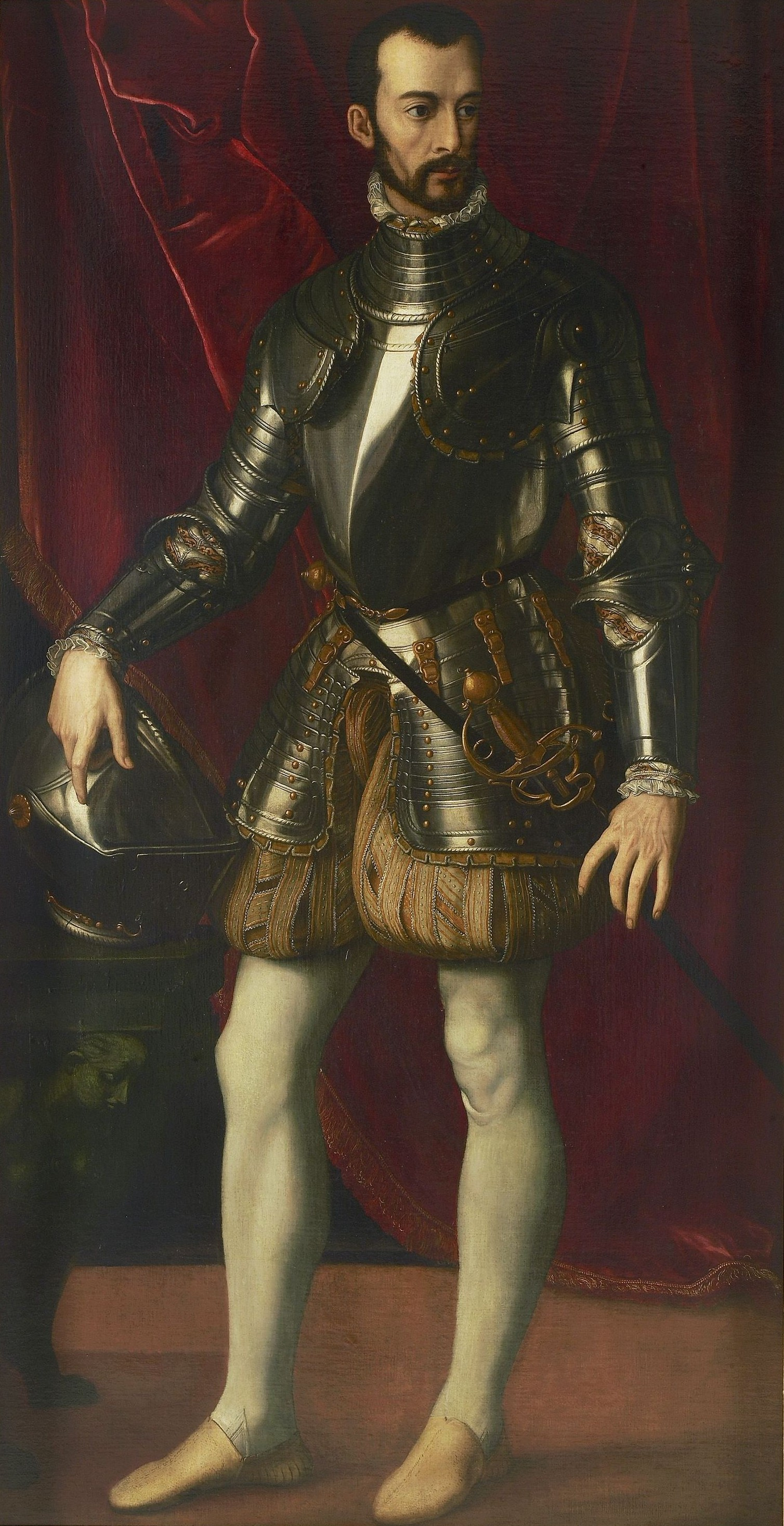 Portrait of Francesco I de' Medici